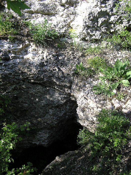 Eingang einer zugeschütteten Schachthöhle am Hesselberg-Südhang, Katasternummer: M016 Fotograf: Oswald Engelhardt